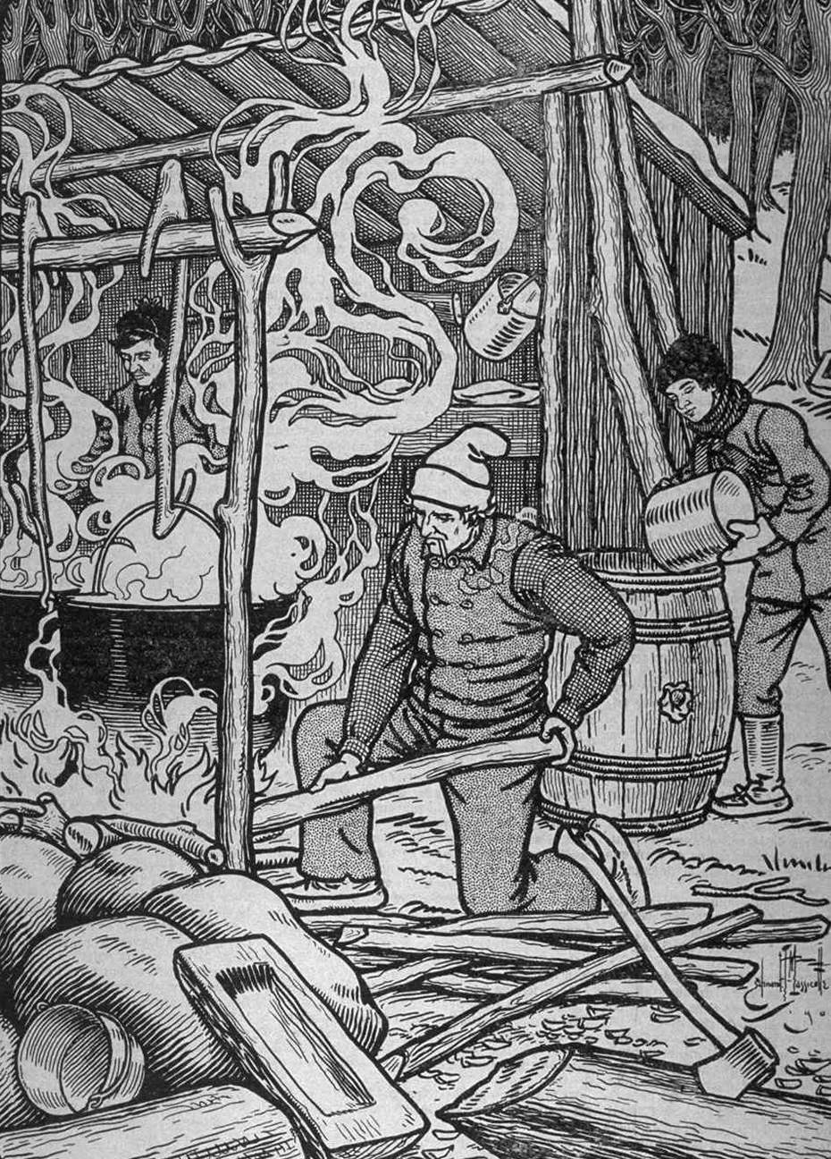 « Les sucres » par Edmond-Joseph Massicotte (1875-1929), gravure tirée de L'album universel, Vol. 19 no 51, p. 1201 (18 avril 1903)